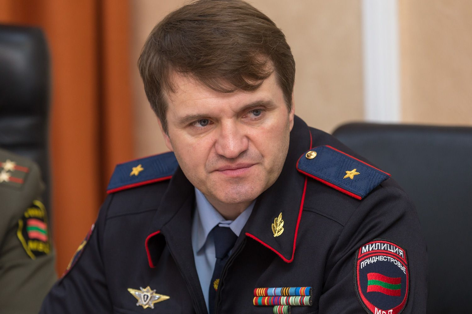 Министр внутренних дел Приднестровской Молдавской Республики